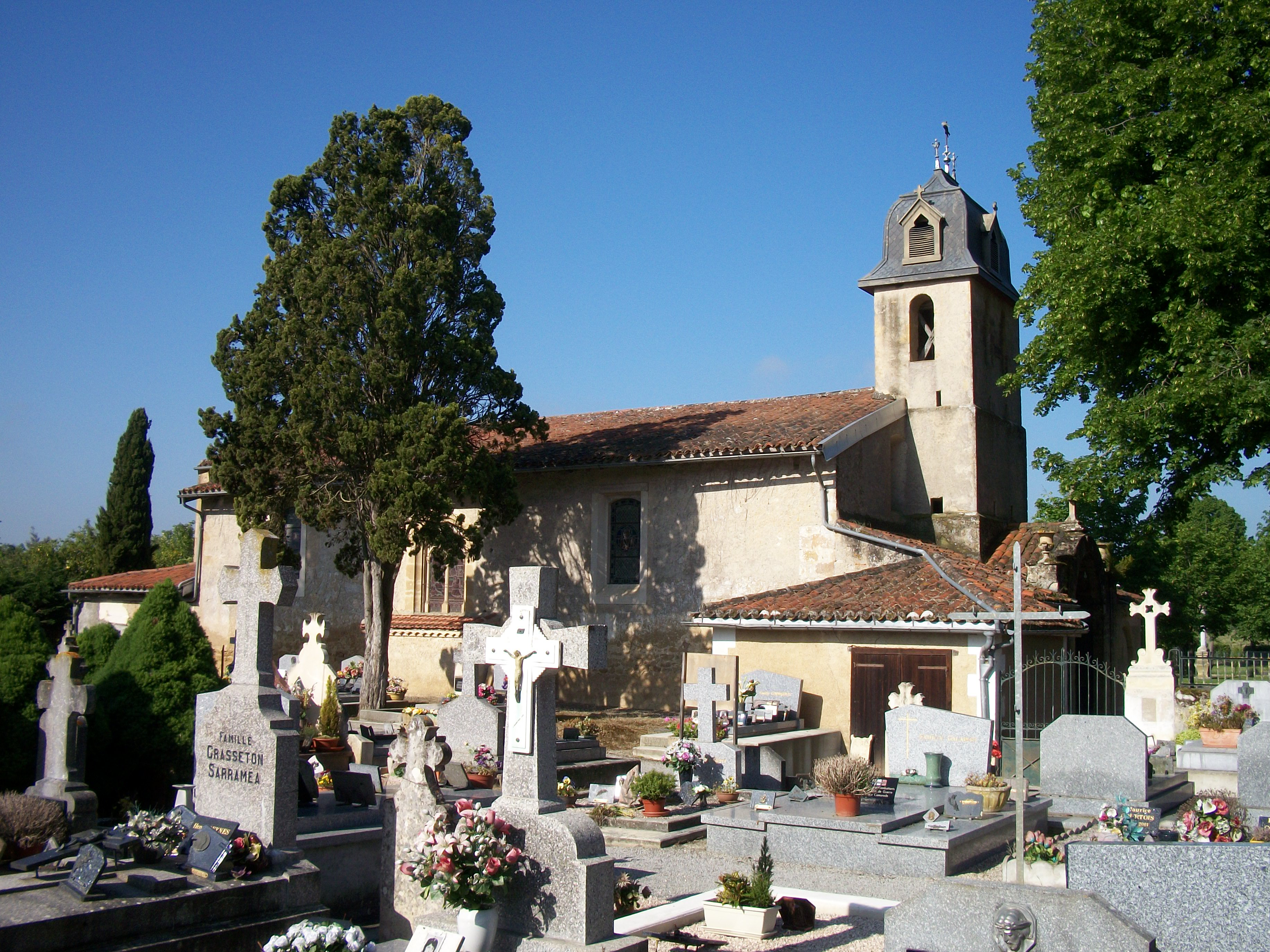 Église de Berdoues (Gers, France)